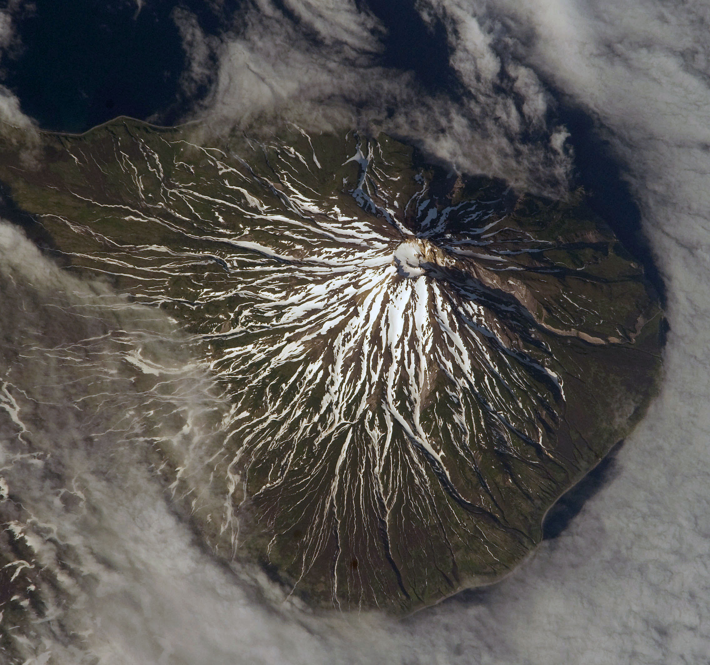 Вулкан Фусса. Снимок с МКС. Фрагмент